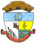 Brasão_Conceição_da_Barra_de_Minas_MG.gif